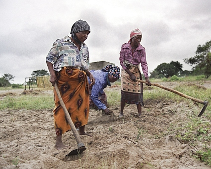 Bäuerinnen bestellen ein Feld in Moçambique.